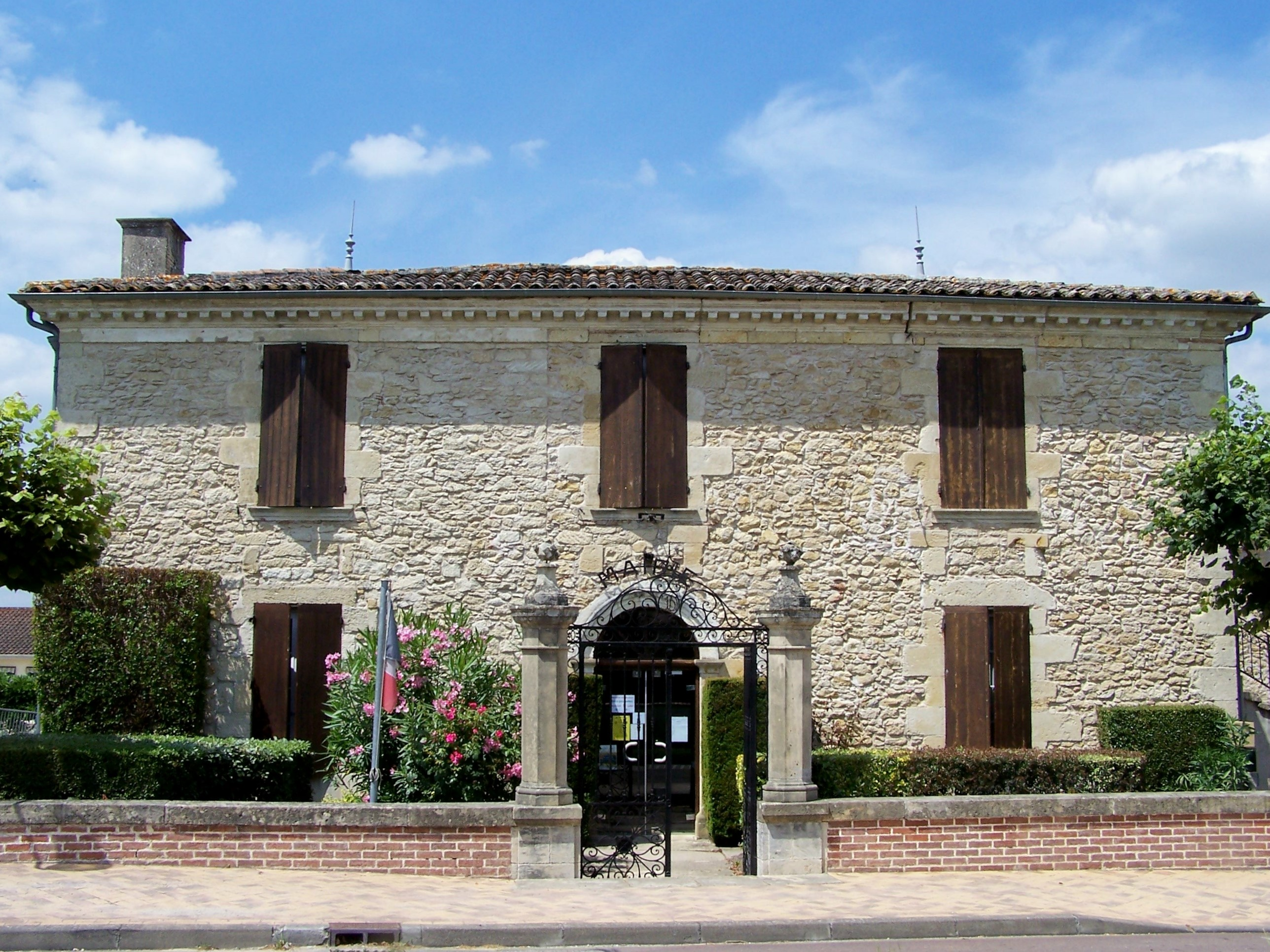 Mairie de Saint-Pierre-de-Mons, Gironde, France